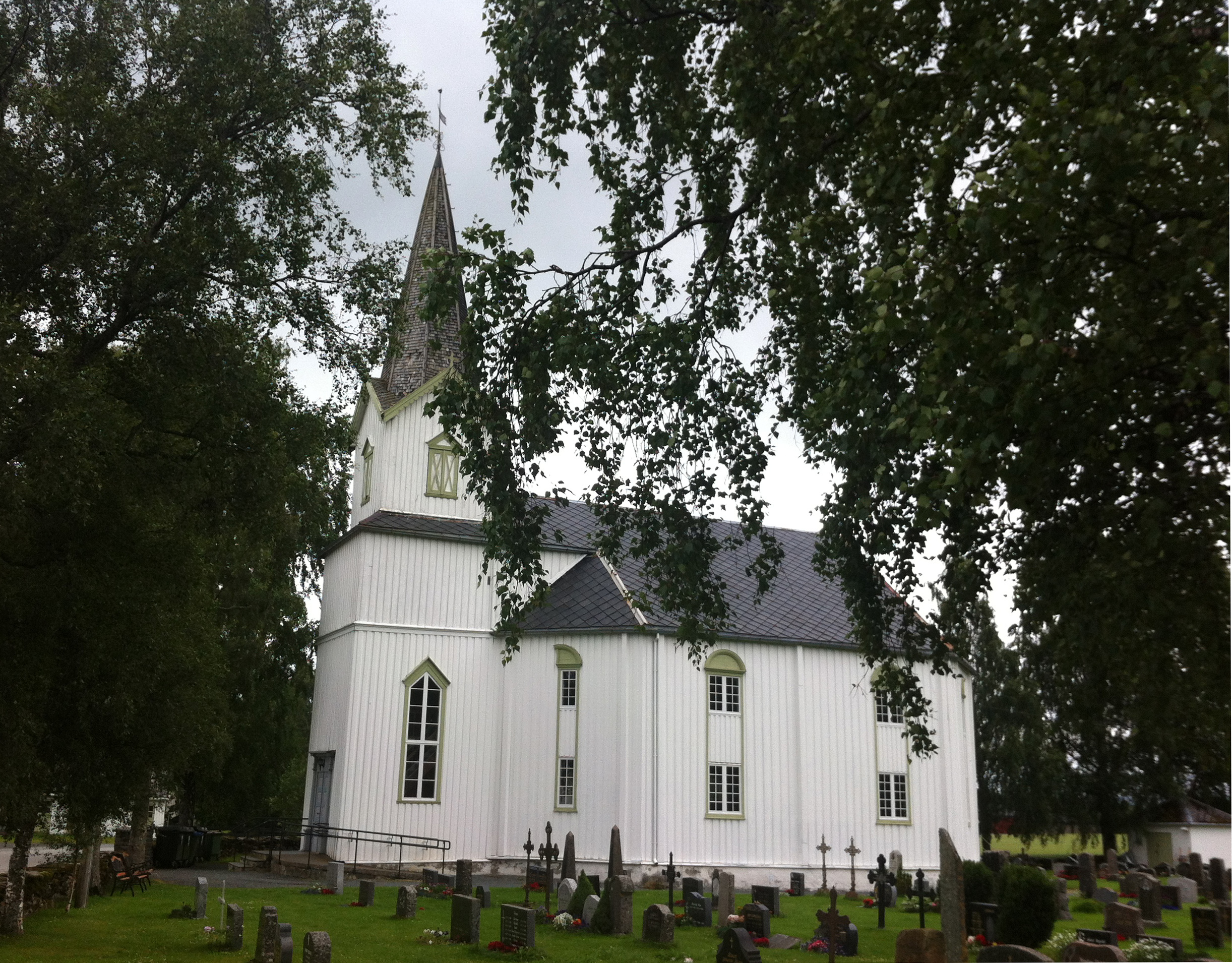 Vinne kirke i Verdal kommune, Nord-Trøndelag. Bygget 1817